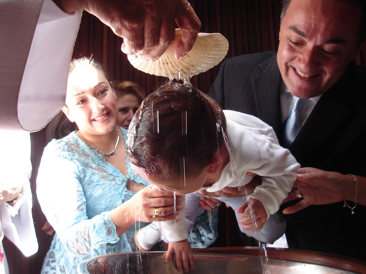 Крещение